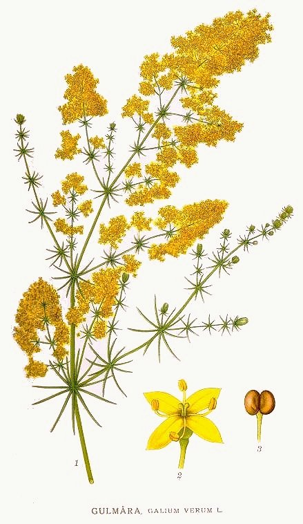 Original Description Gulmåra, Galium verum L.